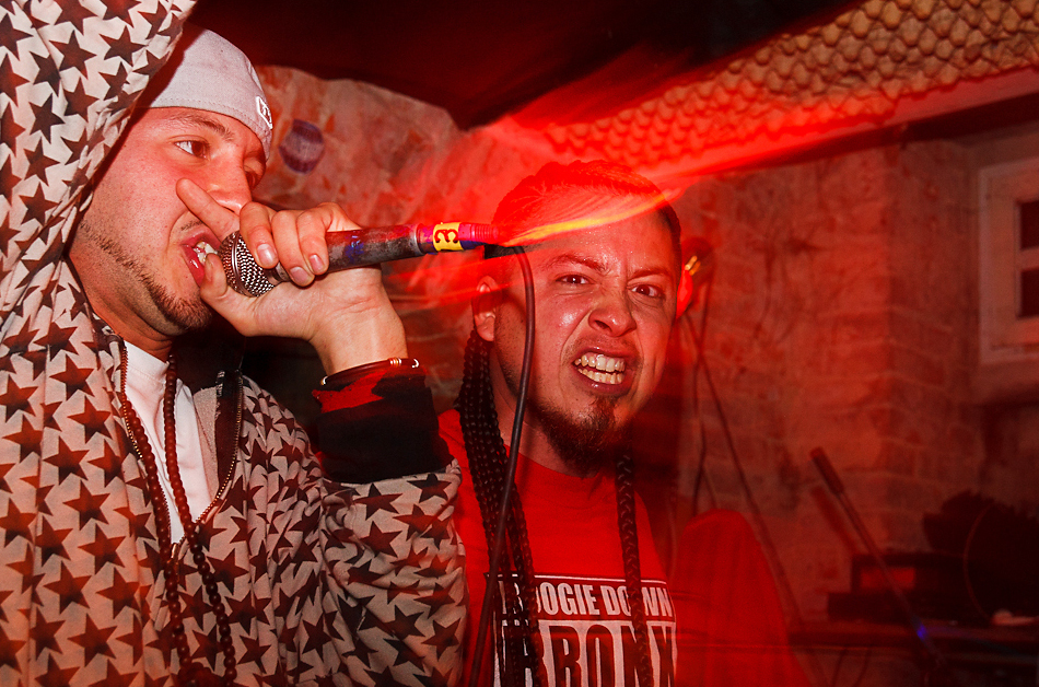 Rebel Díaz presentación especial en su primer día en Alemania (Berlin). Preámbulo de su gira 2011.